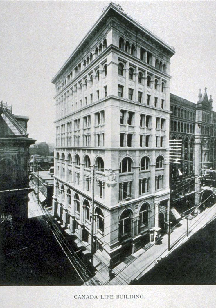 L'édifice de la Canada Life et son environnement immédiat en 1898.